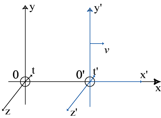 Schéma des référentiels pour les transformations spéciales de Lorentz Description de l'image : schéma montrant les géométries d'espace-temps employées dans le cadre des transformations spéciales de Lorentz. Source : créée à l'occasion de la rédaction du § changement de référentiel de l'article relativité restreinte. Statut : Licence de documentation libre GNU (GFDL : GNU Free Documentation Licence).